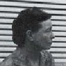 Image of Simone de Beauvoir